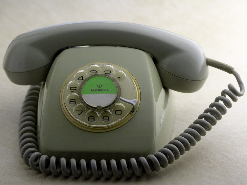 Descripción: Teléfono de Telefónica (CTNE) Fecha: 27/07/2005 Hora: 20:54 Cámara: EOS30D ISO: 400 Tv: 1/50 Av: 5 Autor: aTarom